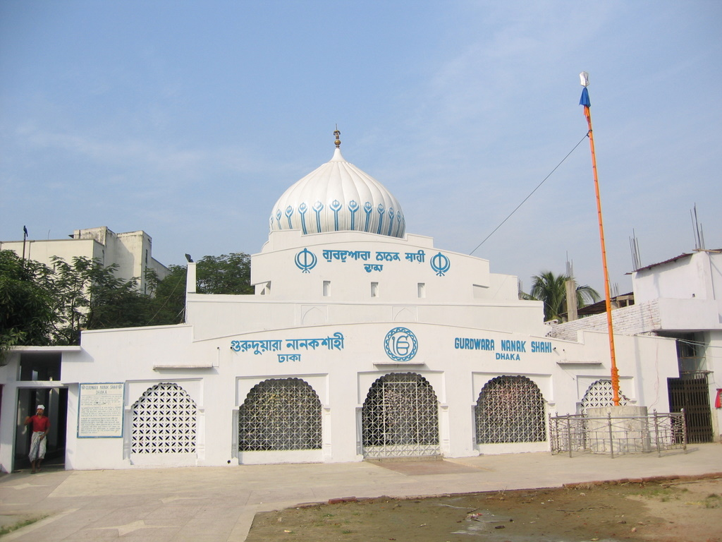 Gurdwara Nanakshahi Dhaka, a Sikh Temple in Dhaka, Bangladesh